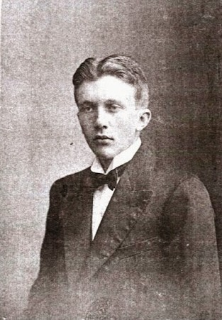 František Kerhart (1897 - 1963), Český architekt.